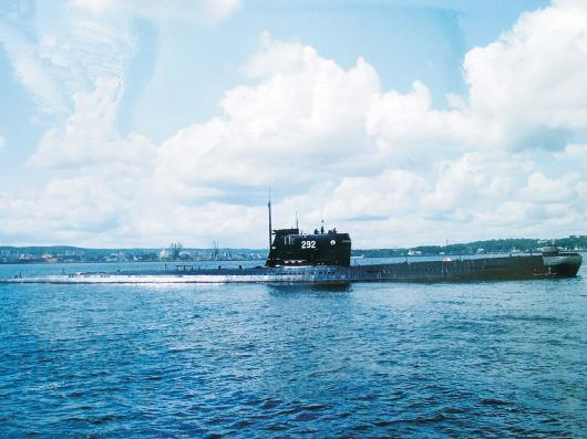 Okręt podwodny ORP Wilk (projektu 641, typu Foxtrot)